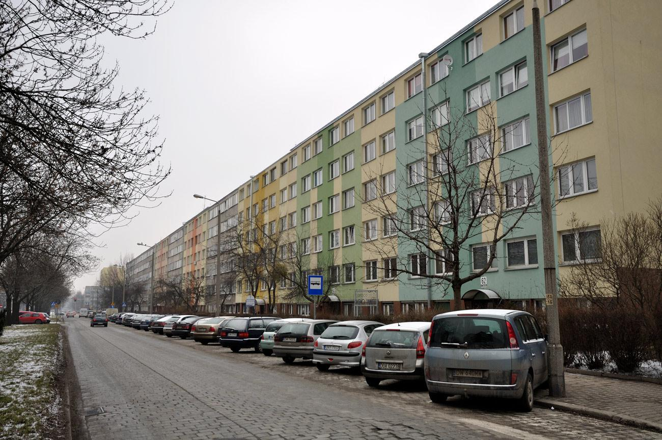 Zaporoska 42-62.